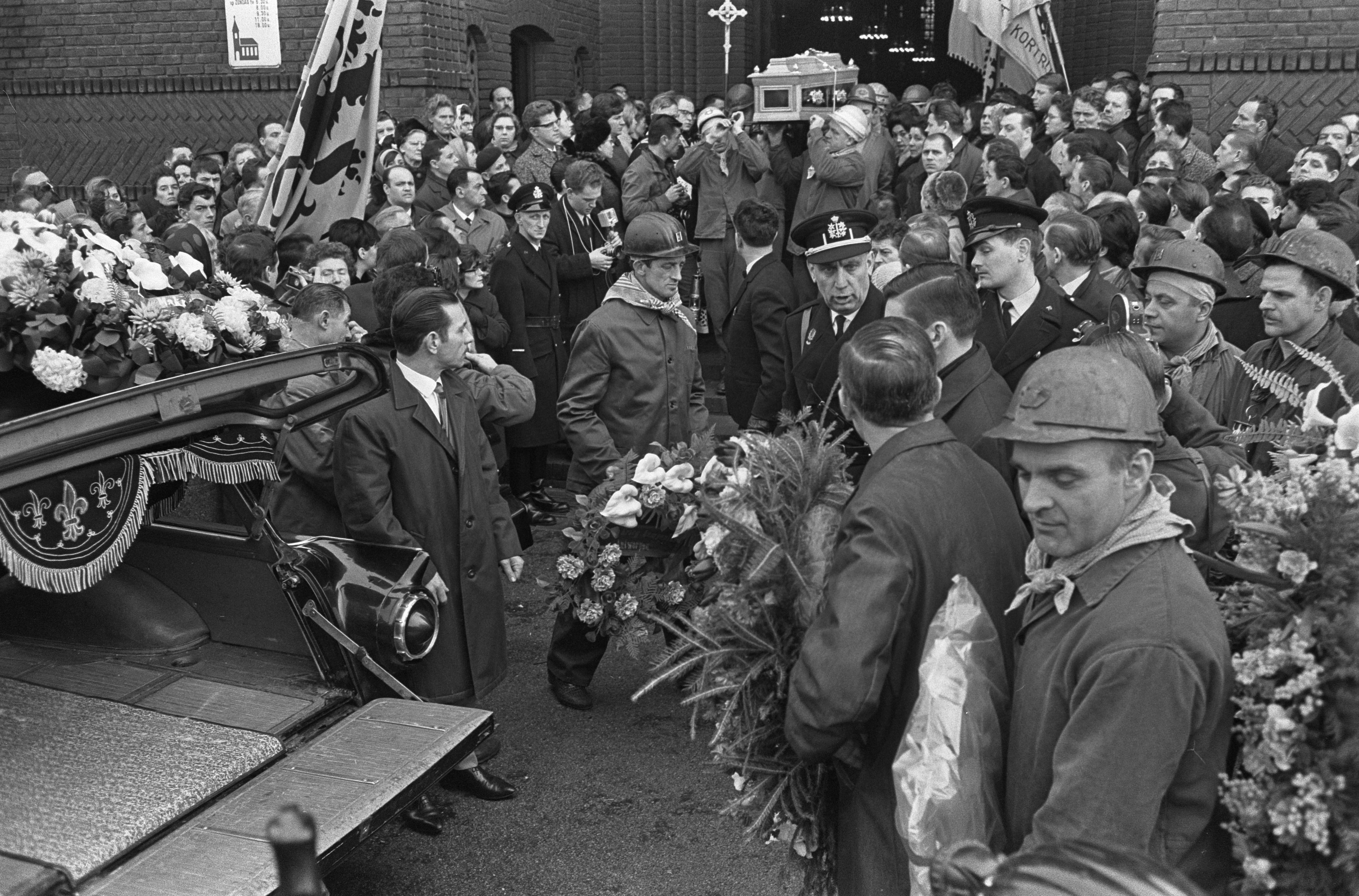 Collectie / Archief : Fotocollectie Anefo Reportage / Serie : [ onbekend ] Beschrijving : Begrafenis mijnwerker in Zwartberg (Belgie), mijnwerkers dragen omgekomen collega uit de Kerk Datum : 3 februari 1966 Locatie : België Trefwoorden : begrafenissen, kerken, mijnwerkers Persoonsnaam : Zwartberg Fotograaf : Koch, Eric / Anefo Auteursrechthebbende : Nationaal Archief Materiaalsoort : Negatief (zwart/wit) Nummer archiefinventaris : bekijk toegang 2.24.01.05 Bestanddeelnummer : 918-7443